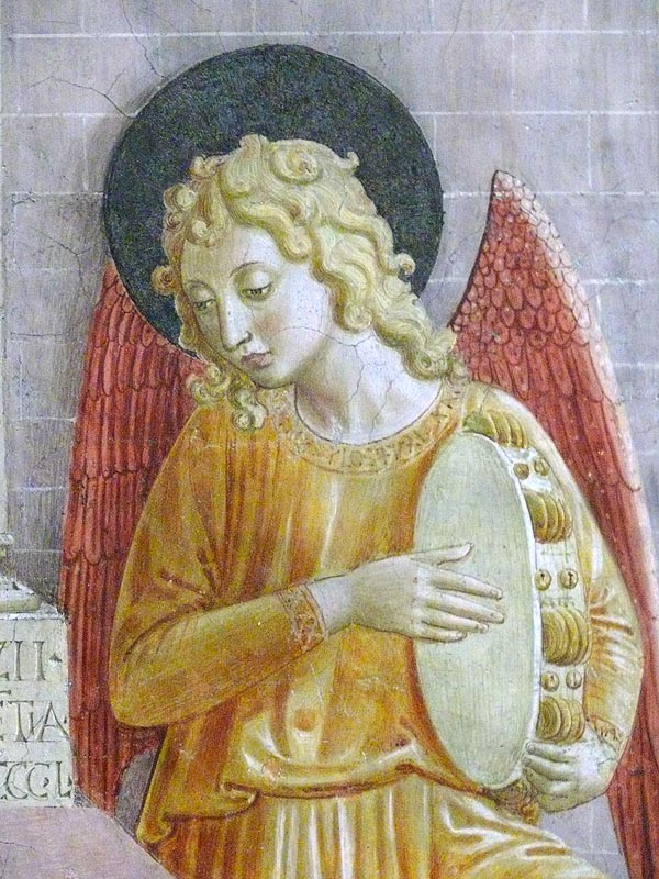 Convento di San Fortunato (Montefalco), Fresco: Mary and child, detail